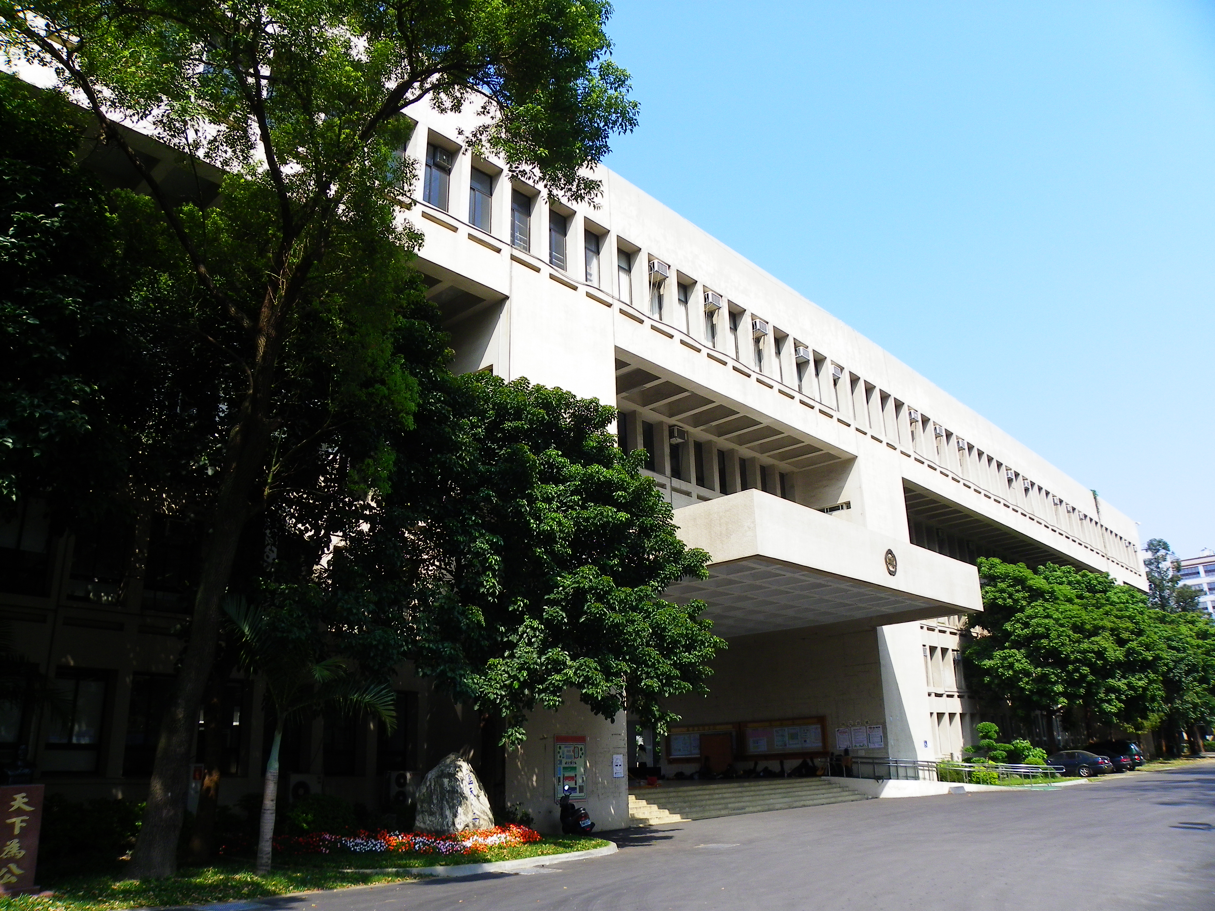 師大附中正門後方的至善樓（新南樓）入口與穿堂。